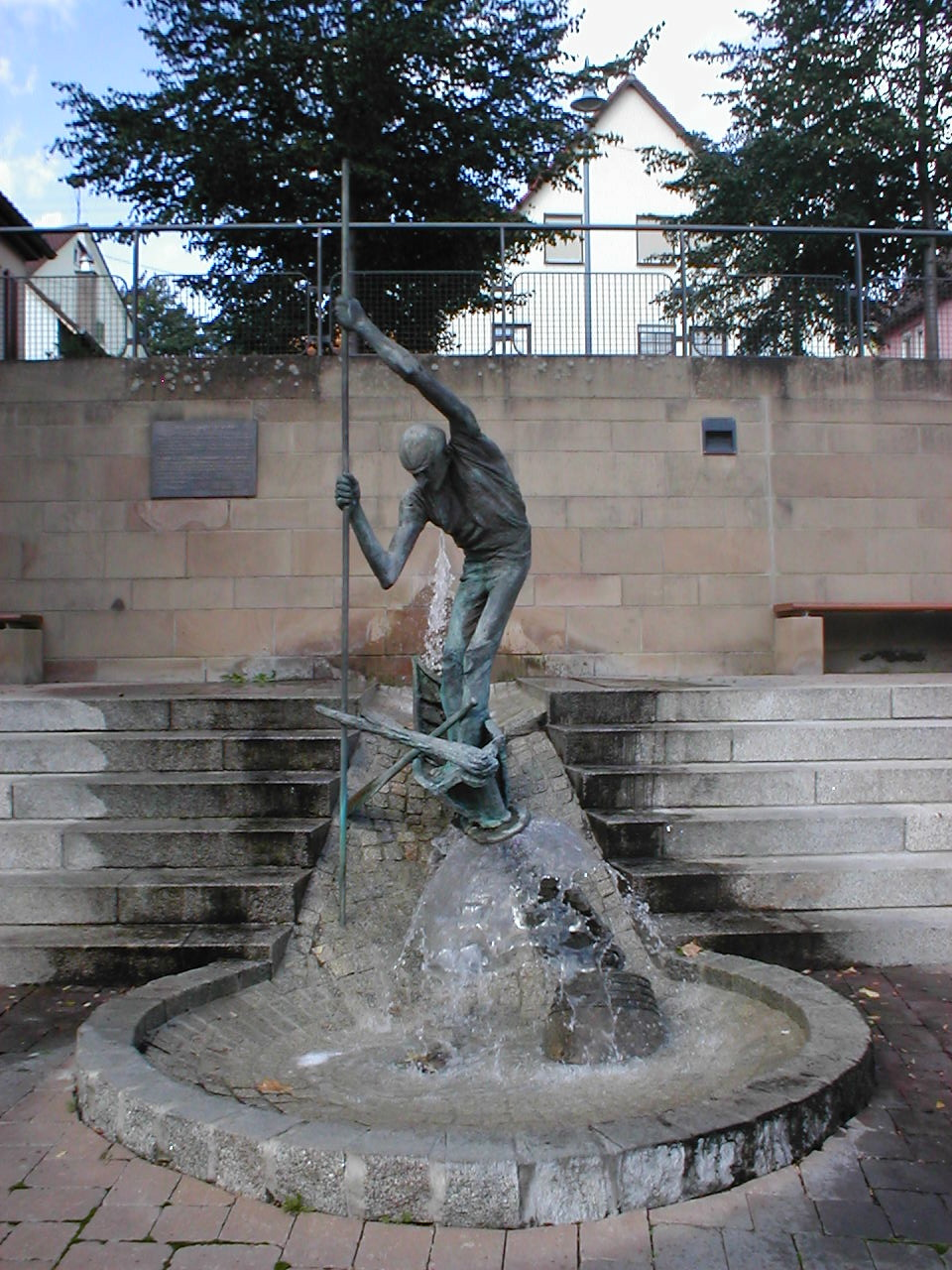 Glockenstuppferbrunnen in Nordheim, gestaltet von Karl-Henning Seemann 2001